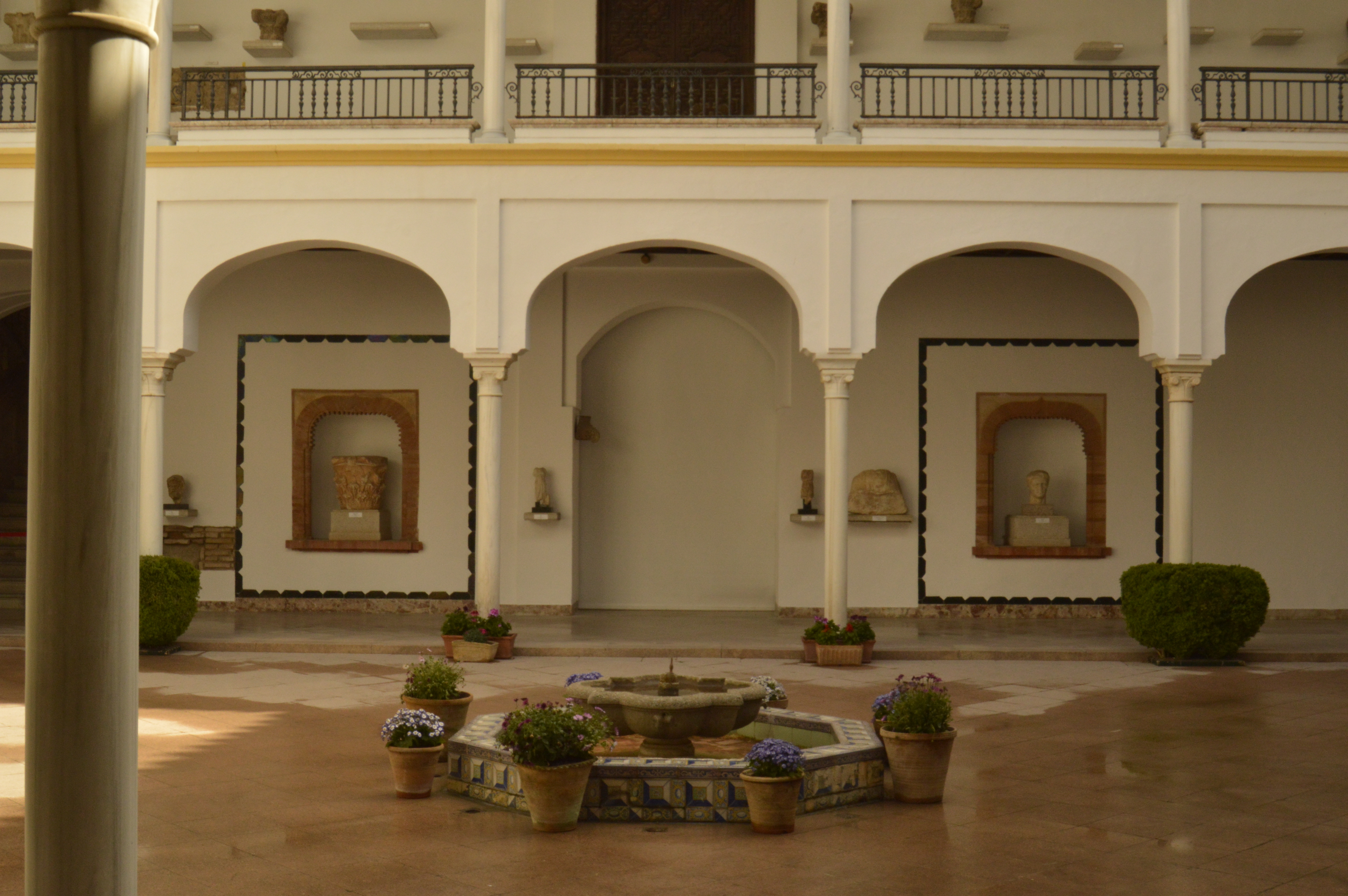 Palacioa